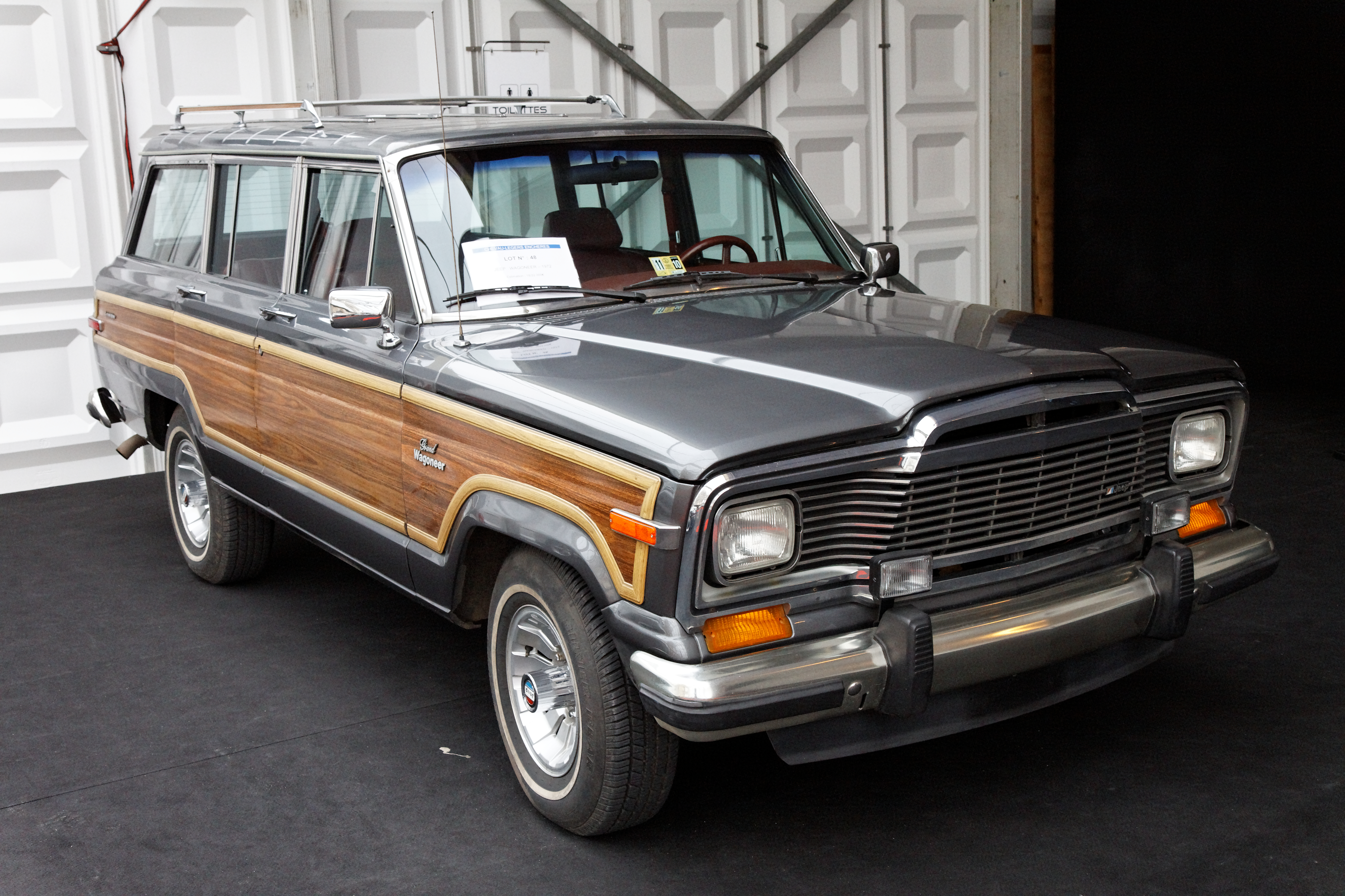 Jeep Wagoneer - Festival Automobile International 2011 - Vente aux enchères